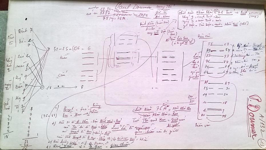 HLDoumer